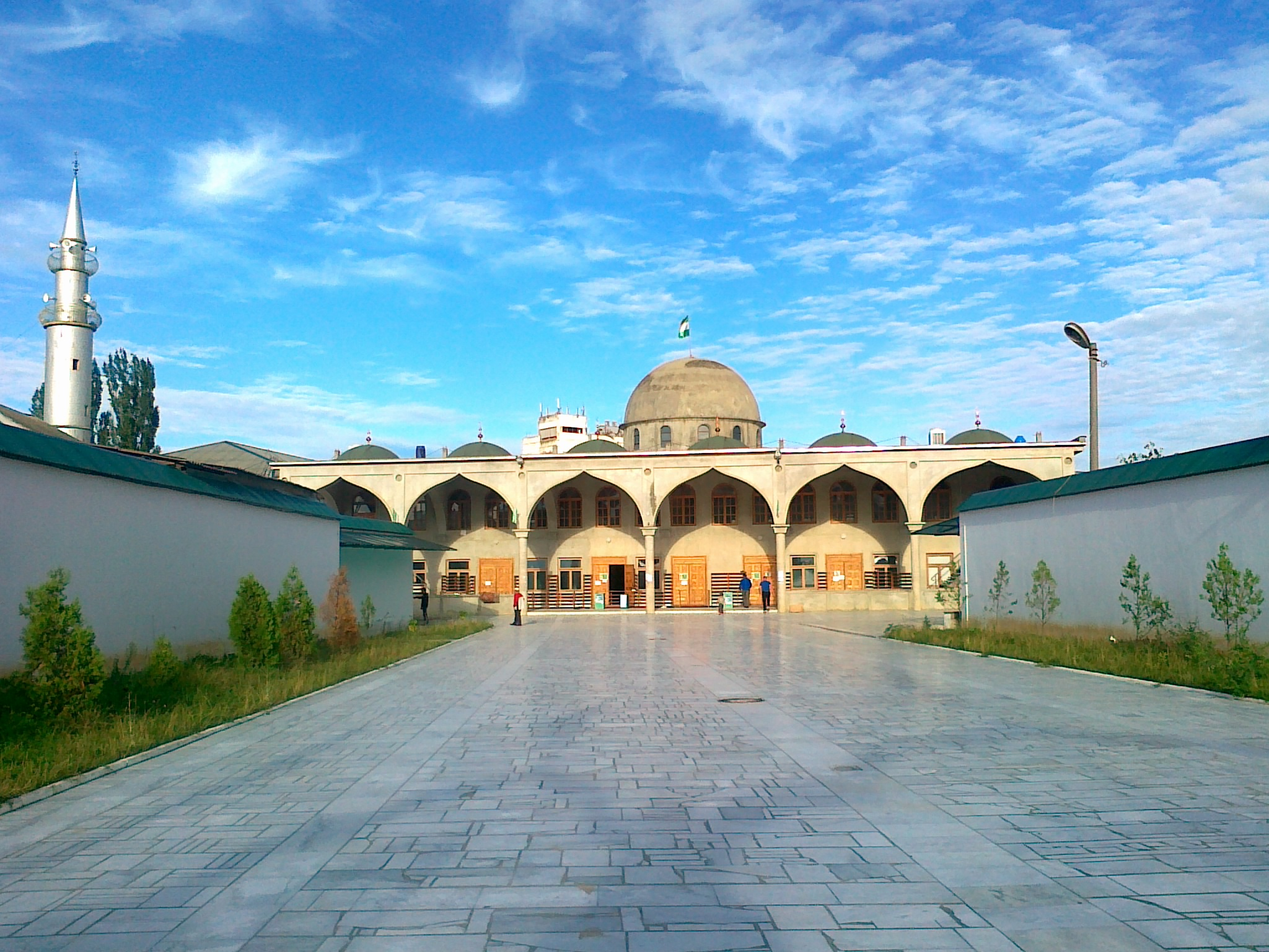 Мечеть в Буйнакске - Дагестан